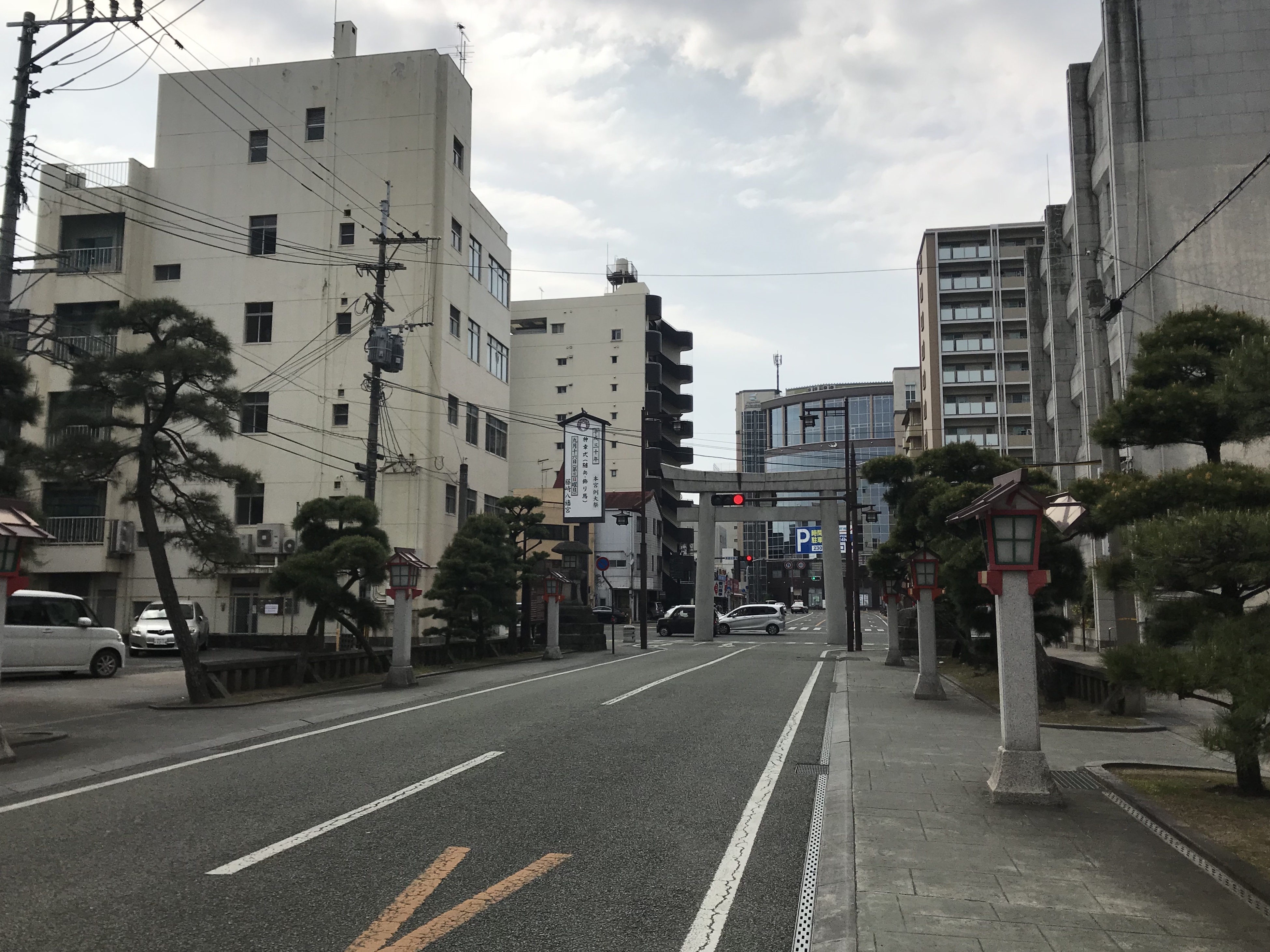 藤崎八旛宮の参道より望む大鳥居と藤崎宮前駅の駅ビル